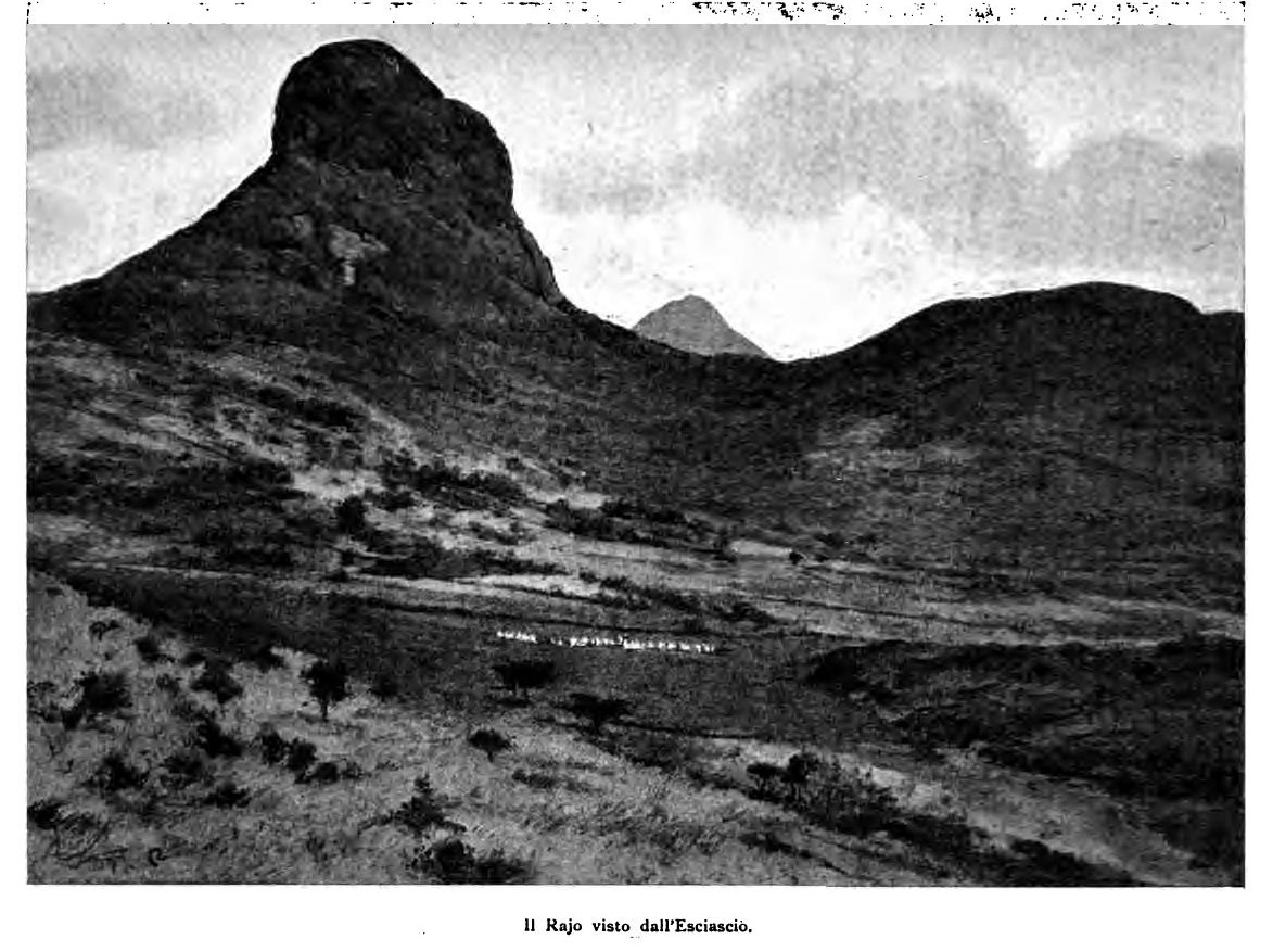 Il Rajo visto dall Esciascio (close to Adua)